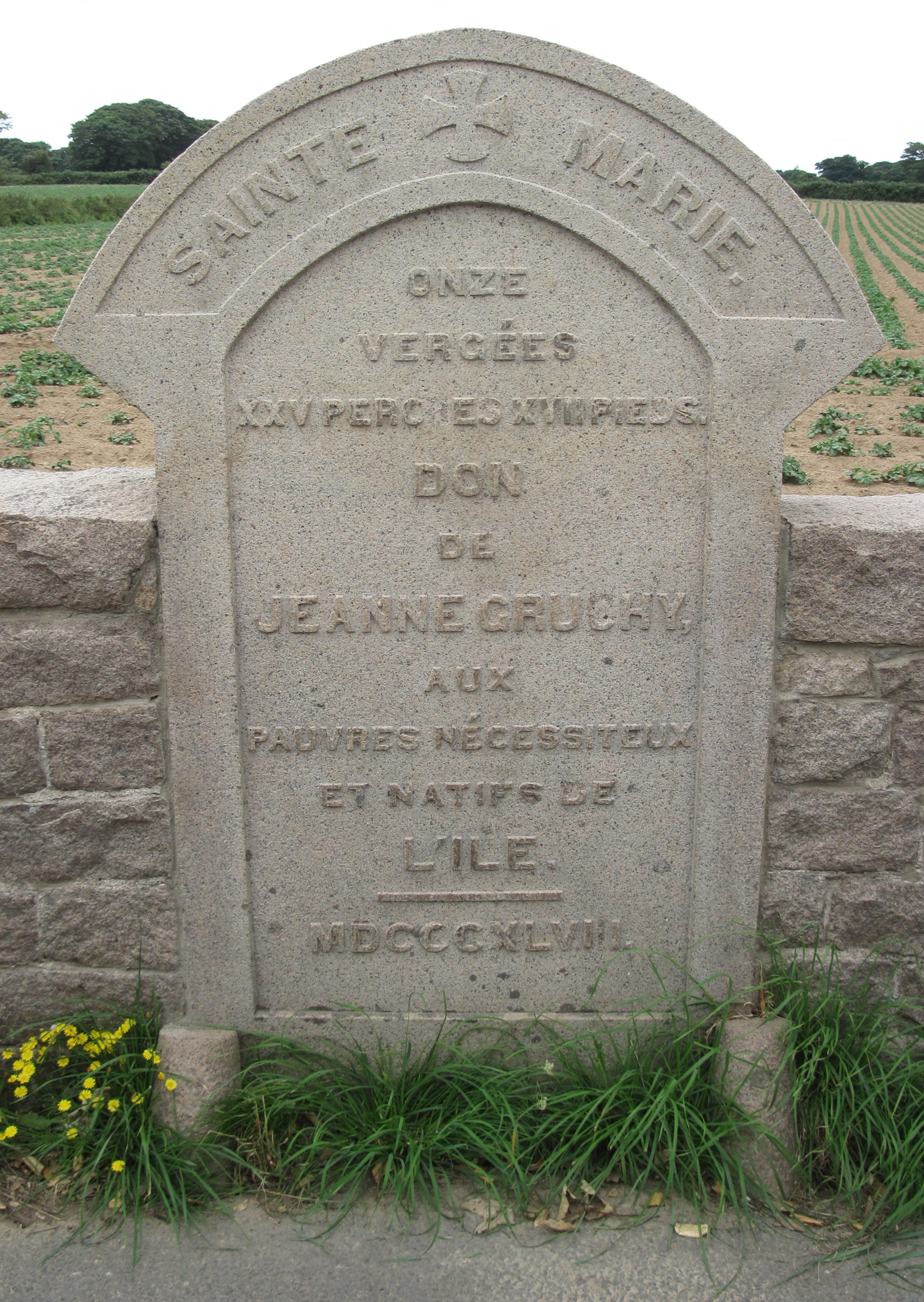 Nrf: Don Jeanne Gruchy, Sainte Mathie, Jèrri